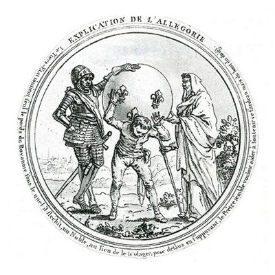 Caricature de l'organisation de la société de l'Ancien Régime. Il est écrit au dessus « EXPLICATION DE L'ALLÉGORIE » et tout autour de l'image « le Tiers-Etat soutient seul le poids du royaume sous lequel il fléchit, un Noble, au lieu de le soulager, pèse dessus en s'appuyant, le Prêtre semble vouloir aider à soutenir ce fardeau mais du bout du doigt. »